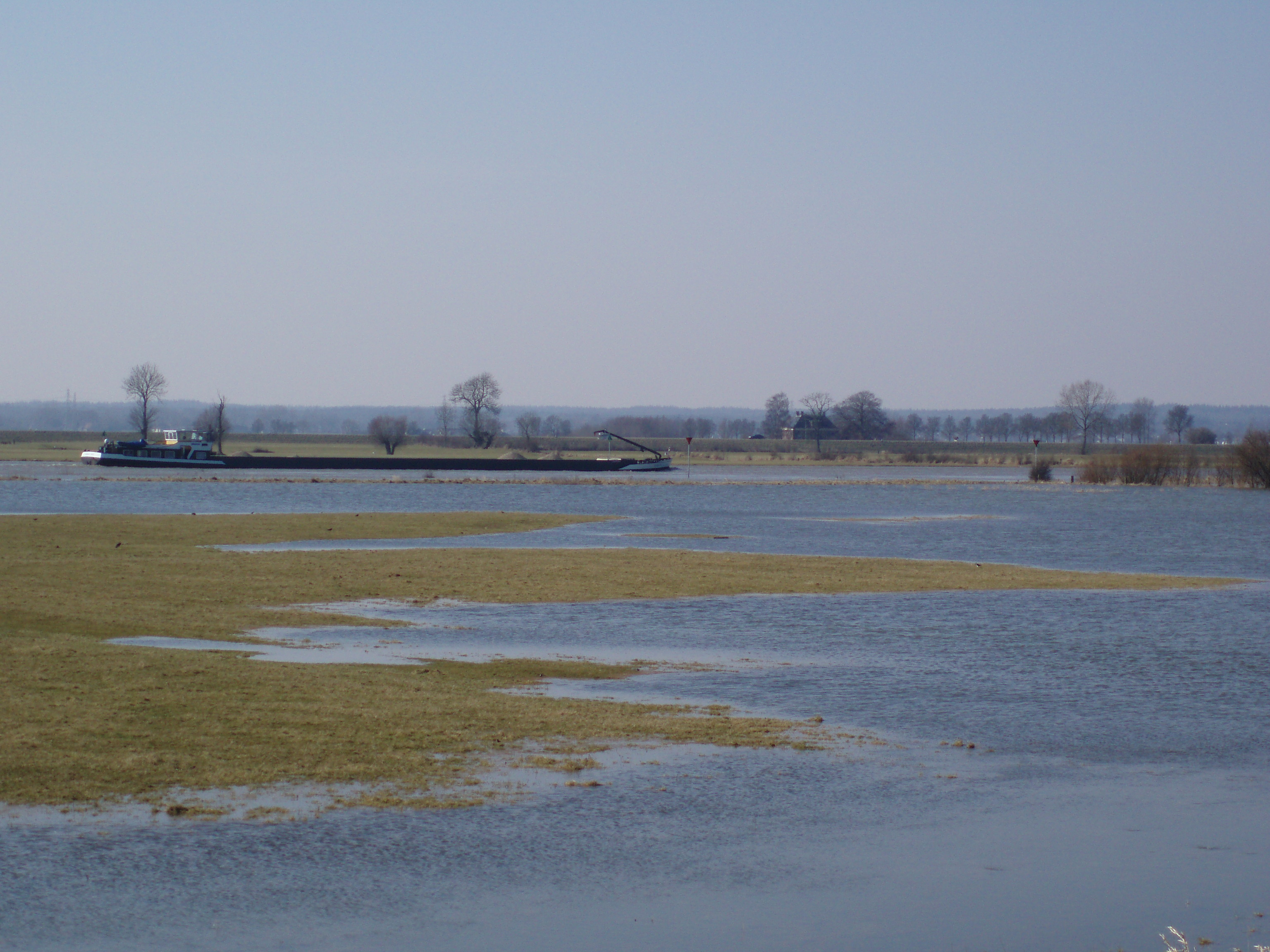 Natuurgebied Buitenwaarden in Wijhe.